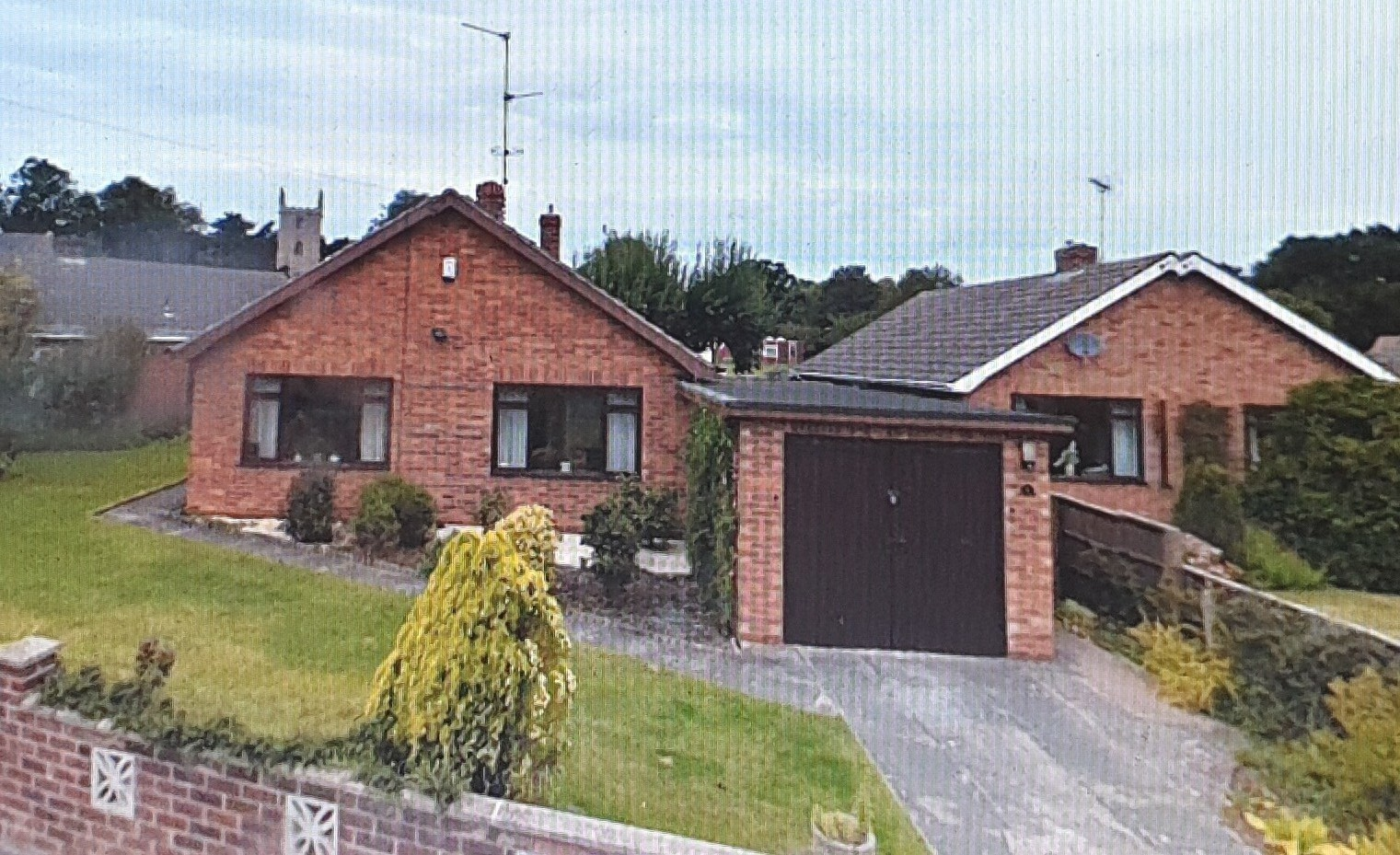 Mary i Władysław Mączewscy (Elston, Anglia)